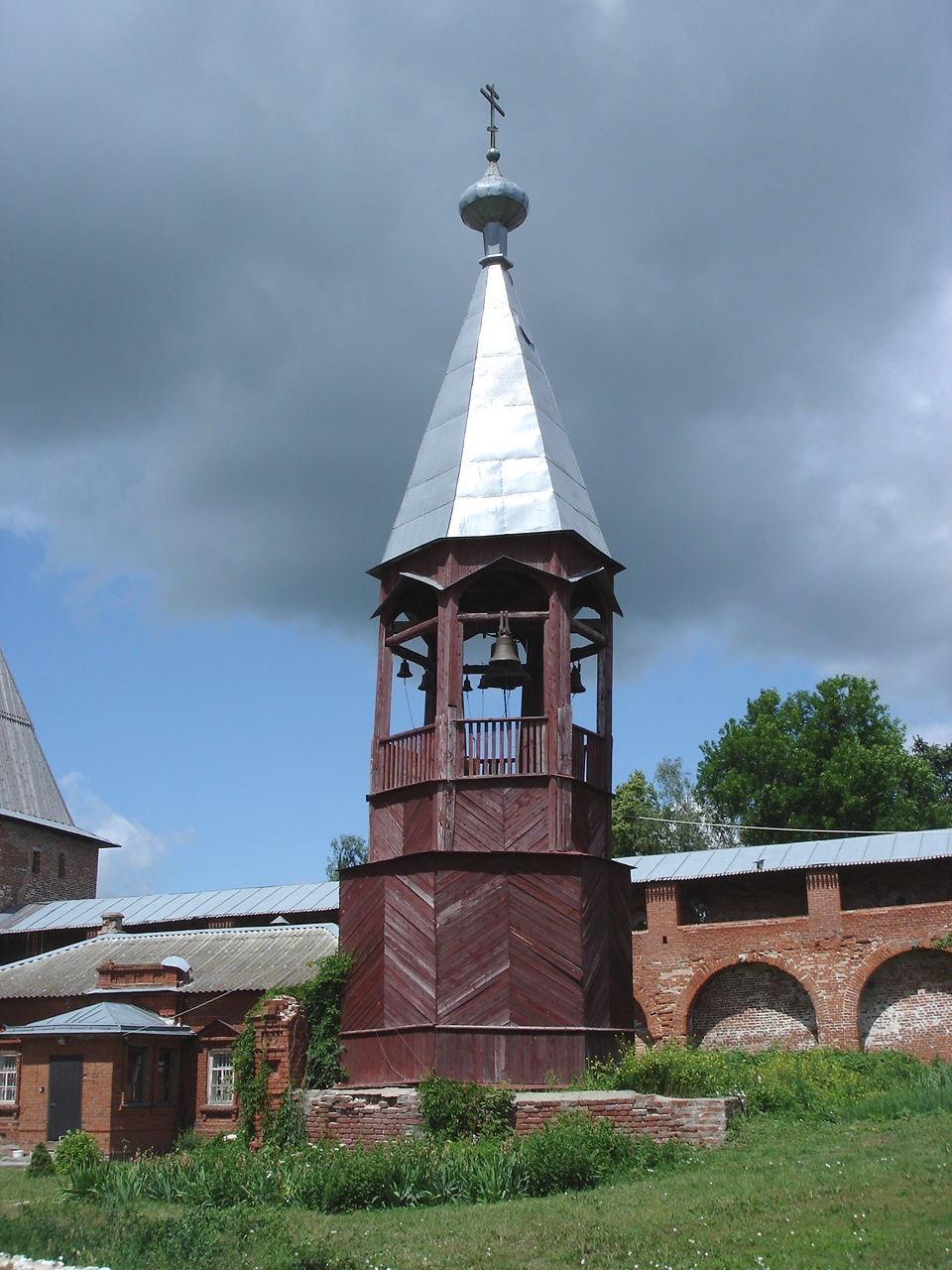 Hölzerner Glockenturm auf dem Gelände des Kremls von Zarajsk (Moskauer Gebiet)